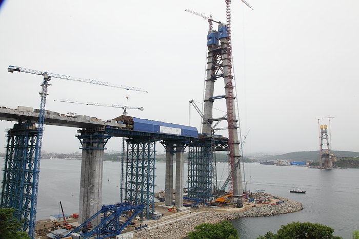 Фотография строящегося моста на остров Русский в Приморском крае